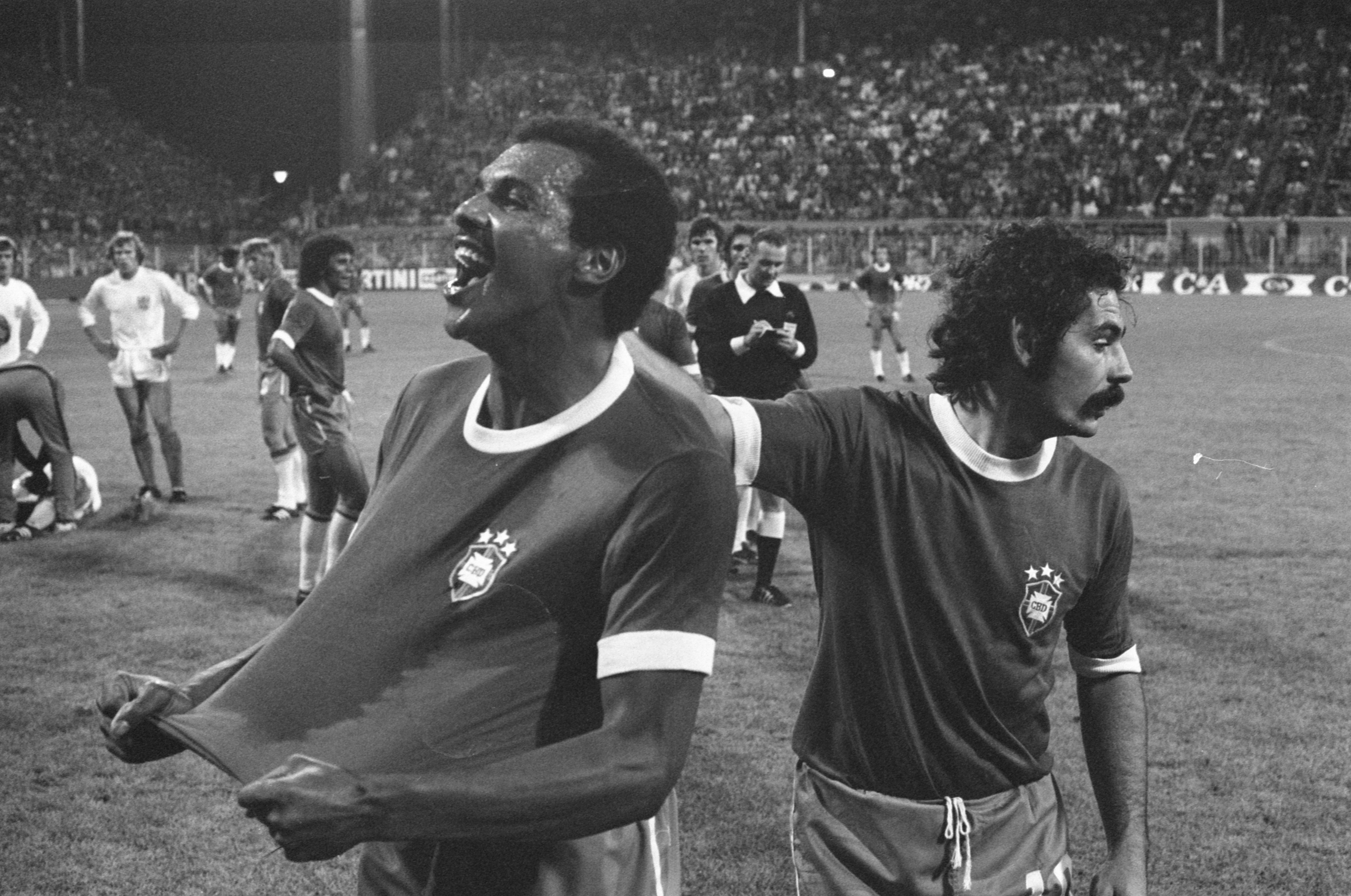 Collectie / Archief : Fotocollectie Anefo Reportage / Serie : [ onbekend ] Beschrijving : WK 74 Nederland tegen Brazilie 2-0, Pereira maakt uitdagende gebaren naar publiek, na uit het veld gestuurd te zijn, rechts Rivelino Datum : 3 juli 1974 Locatie : Dortmund Trefwoorden : sport, voetbal Persoonsnaam : Pereira Luis, Rivelino Instellingsnaam : Nederlands Elftal Fotograaf : Verhoeff, Bert / Anefo Auteursrechthebbende : Nationaal Archief Materiaalsoort : Negatief (zwart/wit) Nummer archiefinventaris : bekijk toegang 2.24.01.05 Bestanddeelnummer : 927-3021